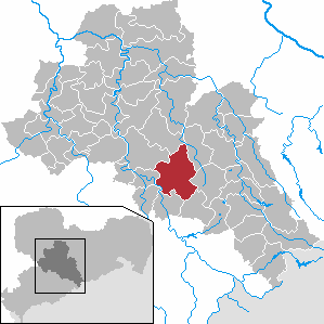 Oederan in Saxony - district Mittelsachsen